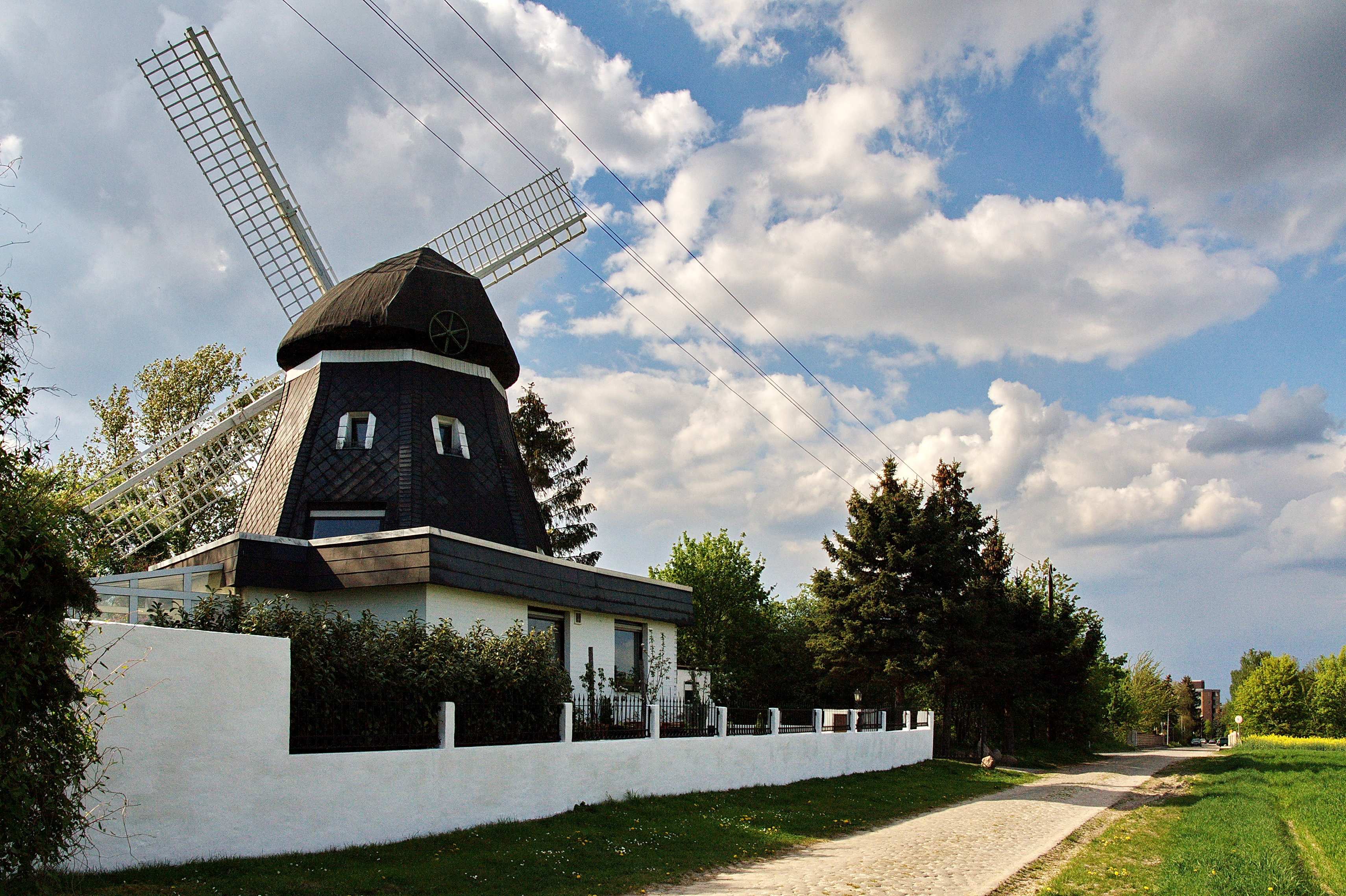 Bockwindmühle in Anderten (Hannover), Niedersachsen, Deutschland